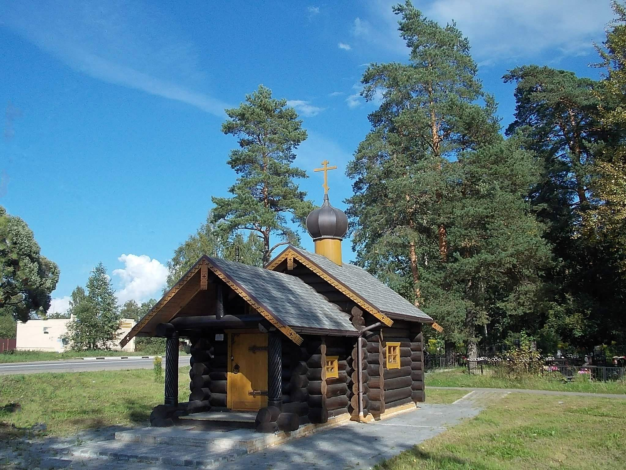 Часовня у кладбища